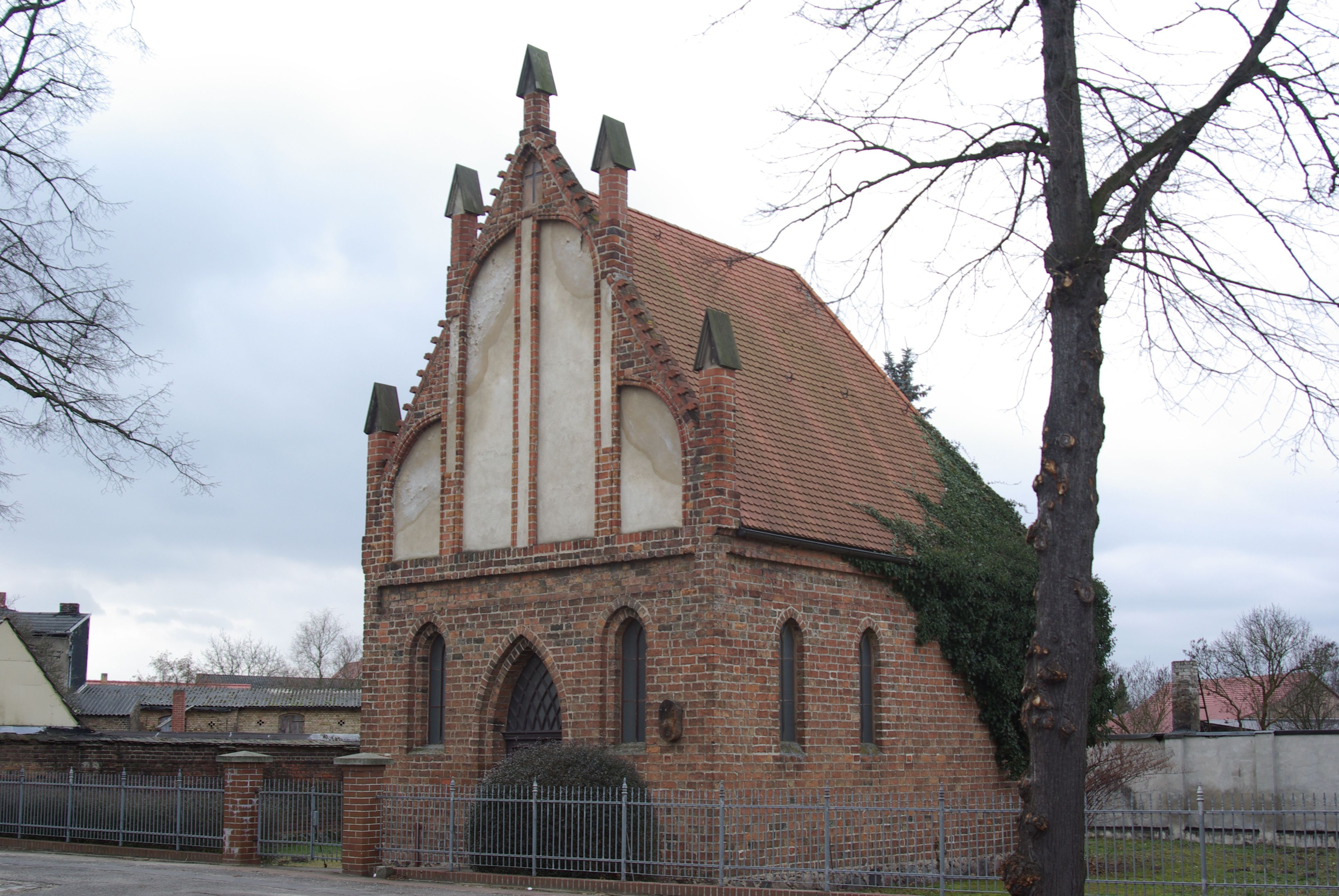 Mittenwalde, Brandenburg. Die Spitalkapelle St. Georg in der Berliner Vorstadt. Die Kapelle ist in der Denkmalsliste eingetragen (geotags in den exif-daten).